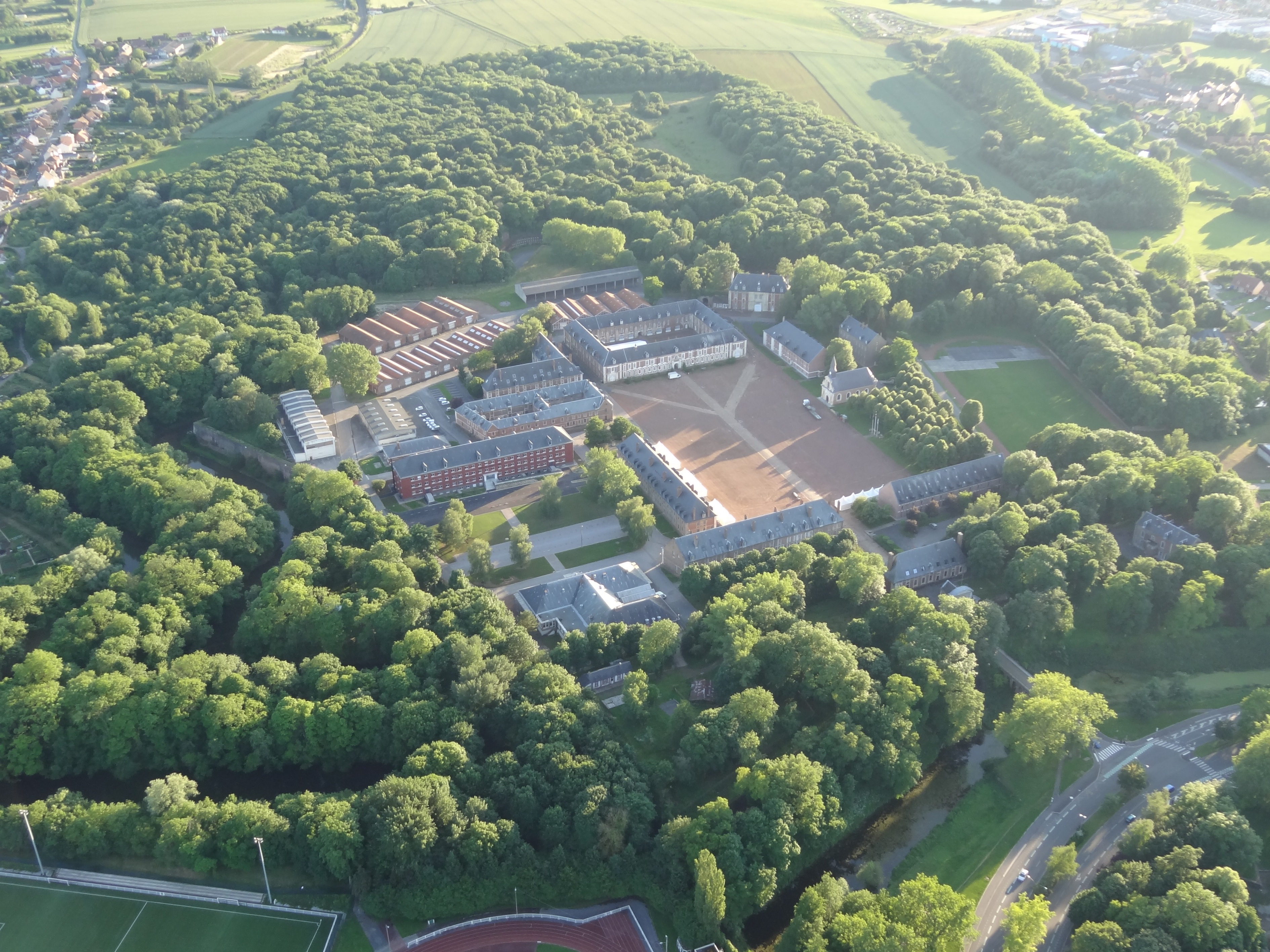 Citadelle (Classé) .